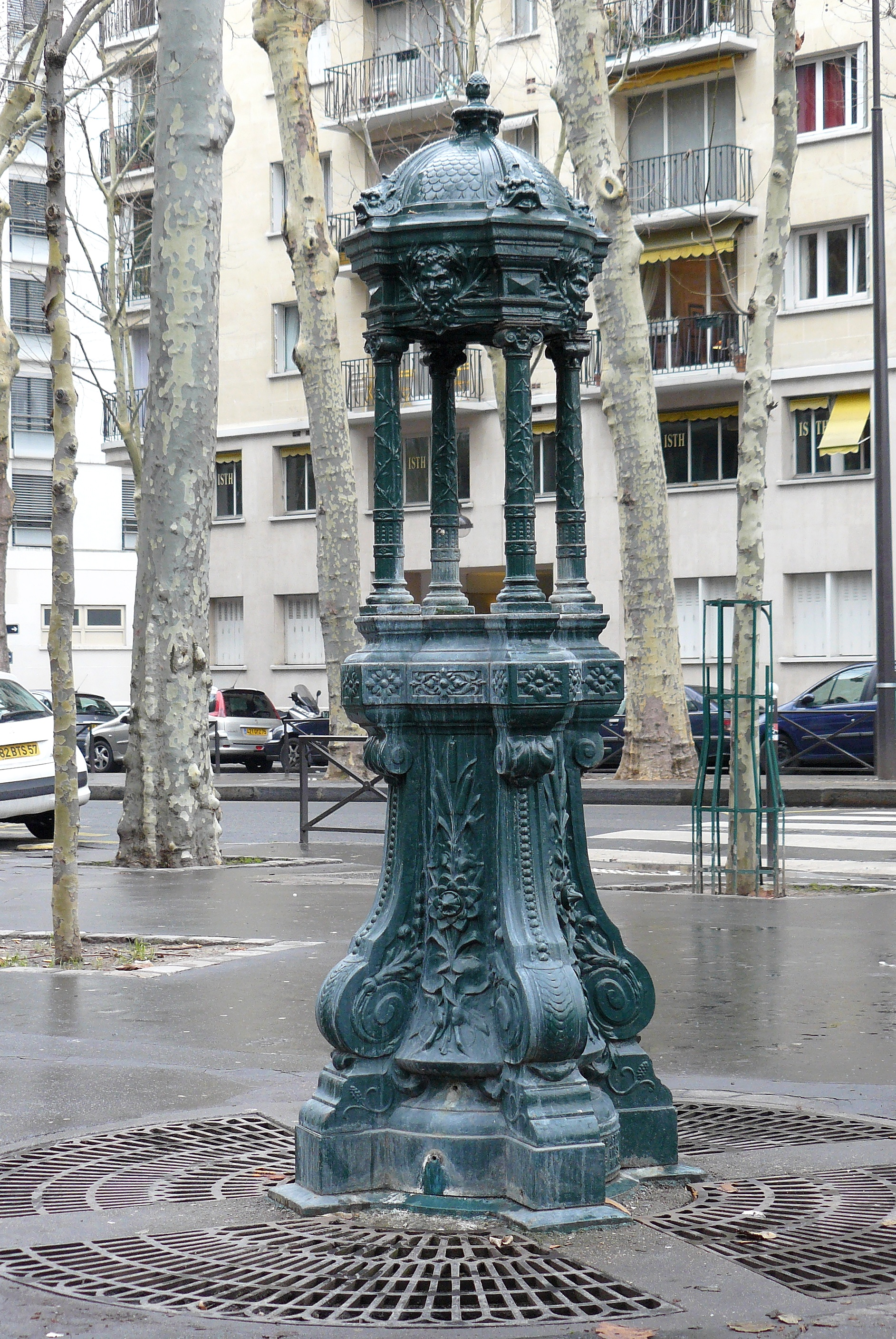 Fontaine Wallace - Modèle à colonnes remplaçant les carriatides - en bas de la rue de Rémusat, place de Barcelone, près du pont Mirabeau, Paris XVIe arrond.